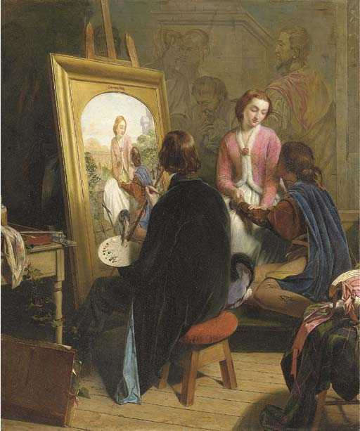 A satire painting